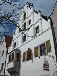 Bürgermeisterhaus am Unteren Markt in Weiden i.d.OPf.